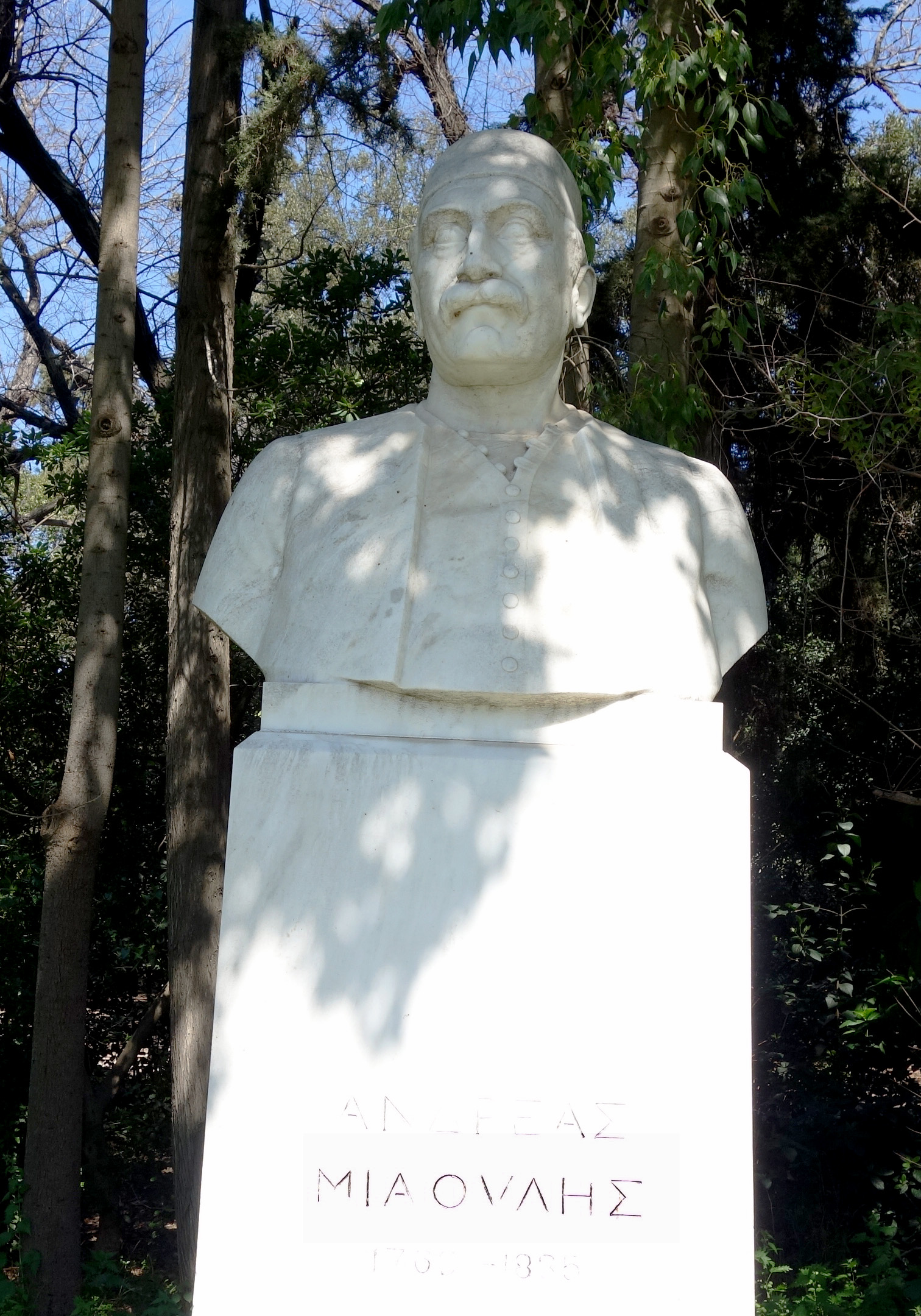 Άγαλμα του Ανδρέα Μιαούλη(έργο του Ανδρεα Ζαγγόπουλου - 1937) στο Πεδίον το Άρεως